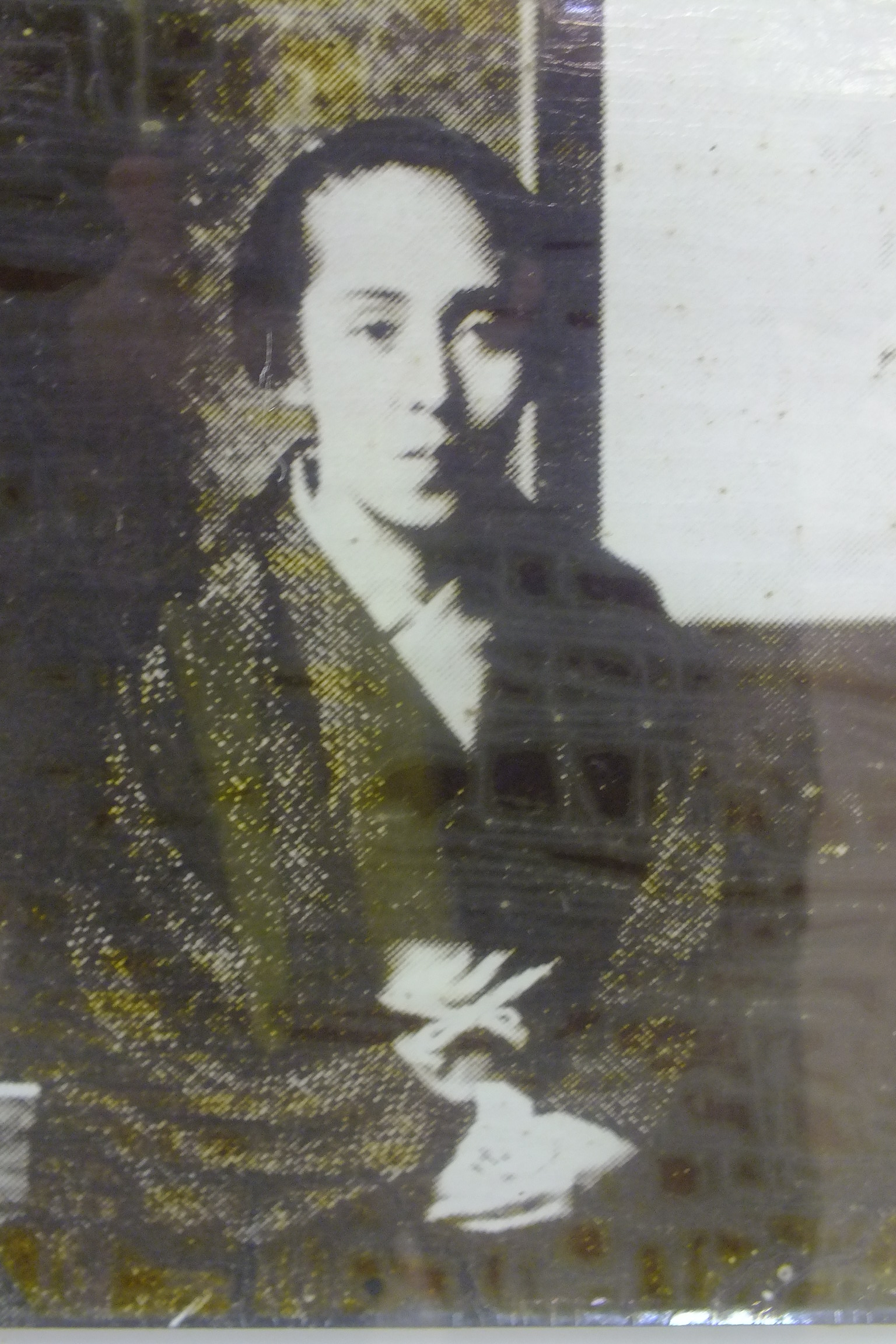 2017-07-01 photograph of Ikuko Nagao(長尾郁子) taken in 1911 DSCF4753